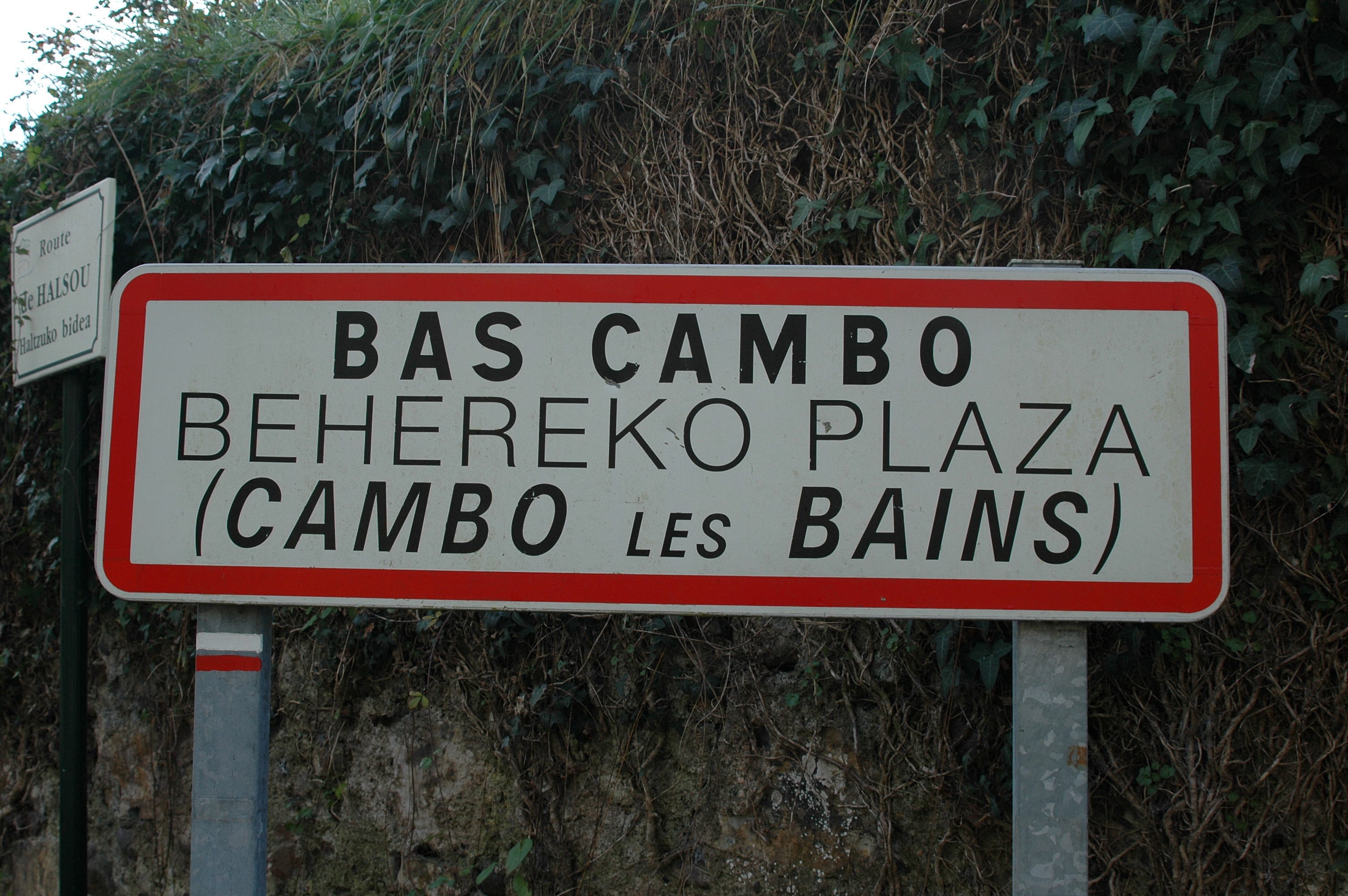 Bas-Cambo, panneau bilingue, photo prise le 31/12/06 par Harrieta171